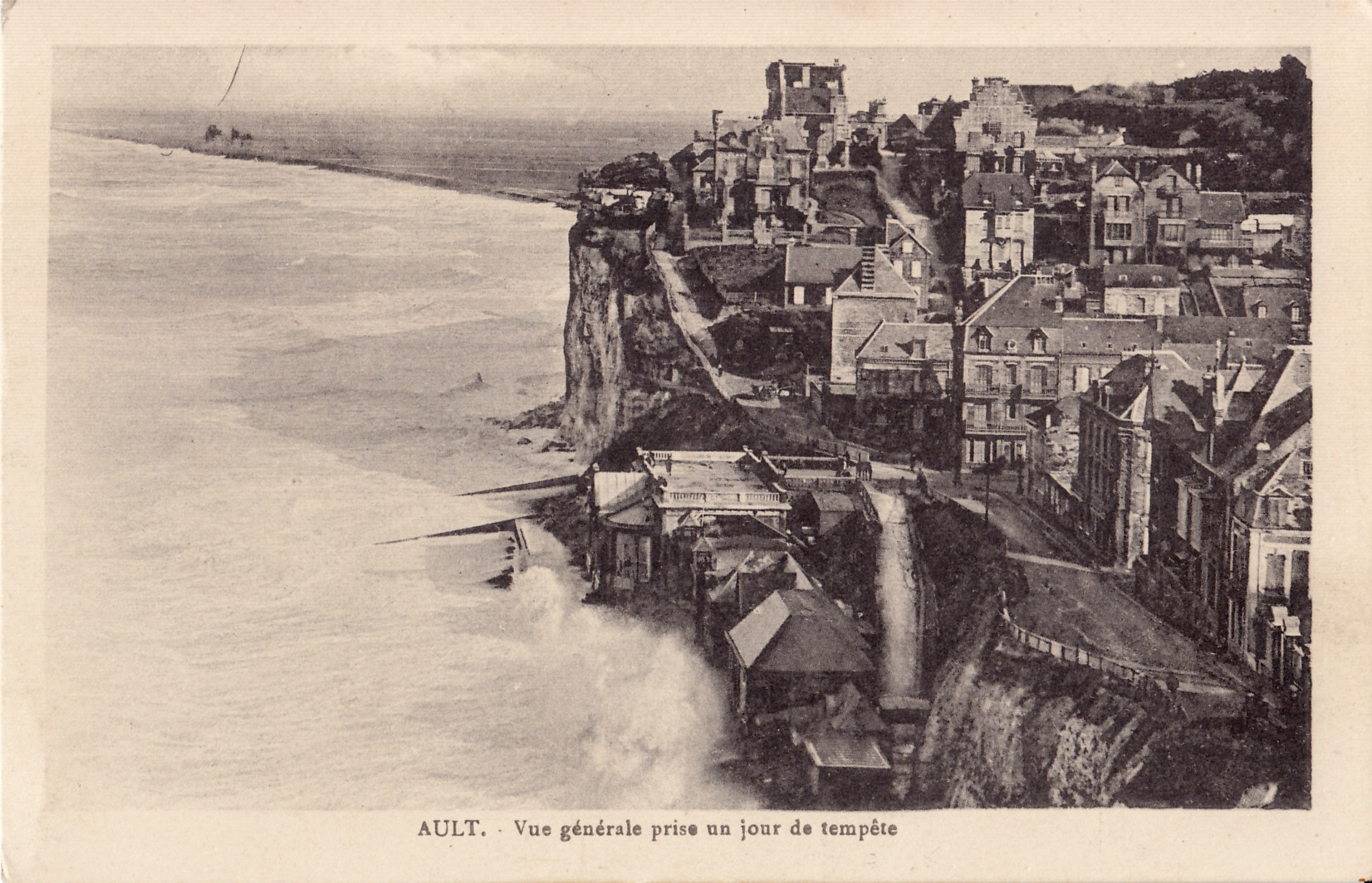 Carte postale ancienne éditée par Lévêque, 26 Grande Rue à Ault-Onival : AULT - Vue générale un jour de tempête